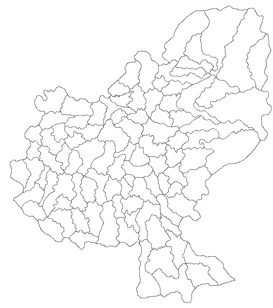 Categorie:Hărţi ale judeţului Mureş